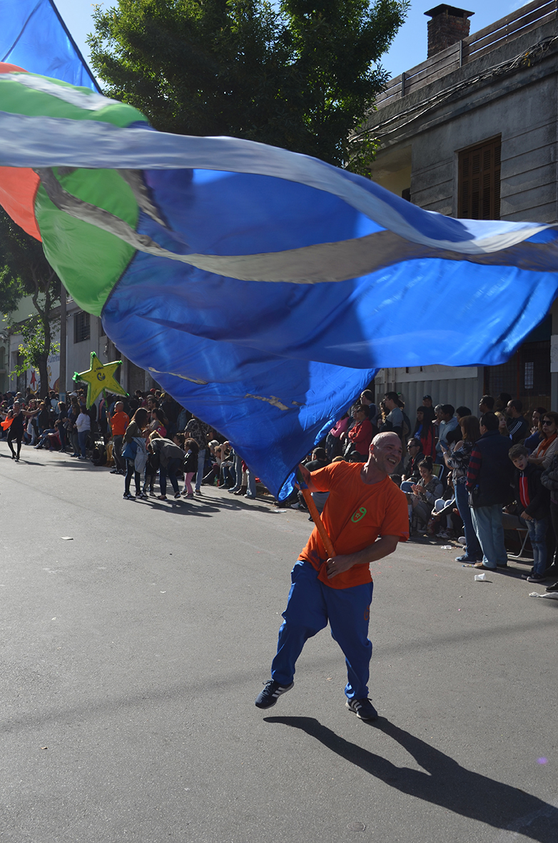 Défilé des llamadas à Montevideo - 2018